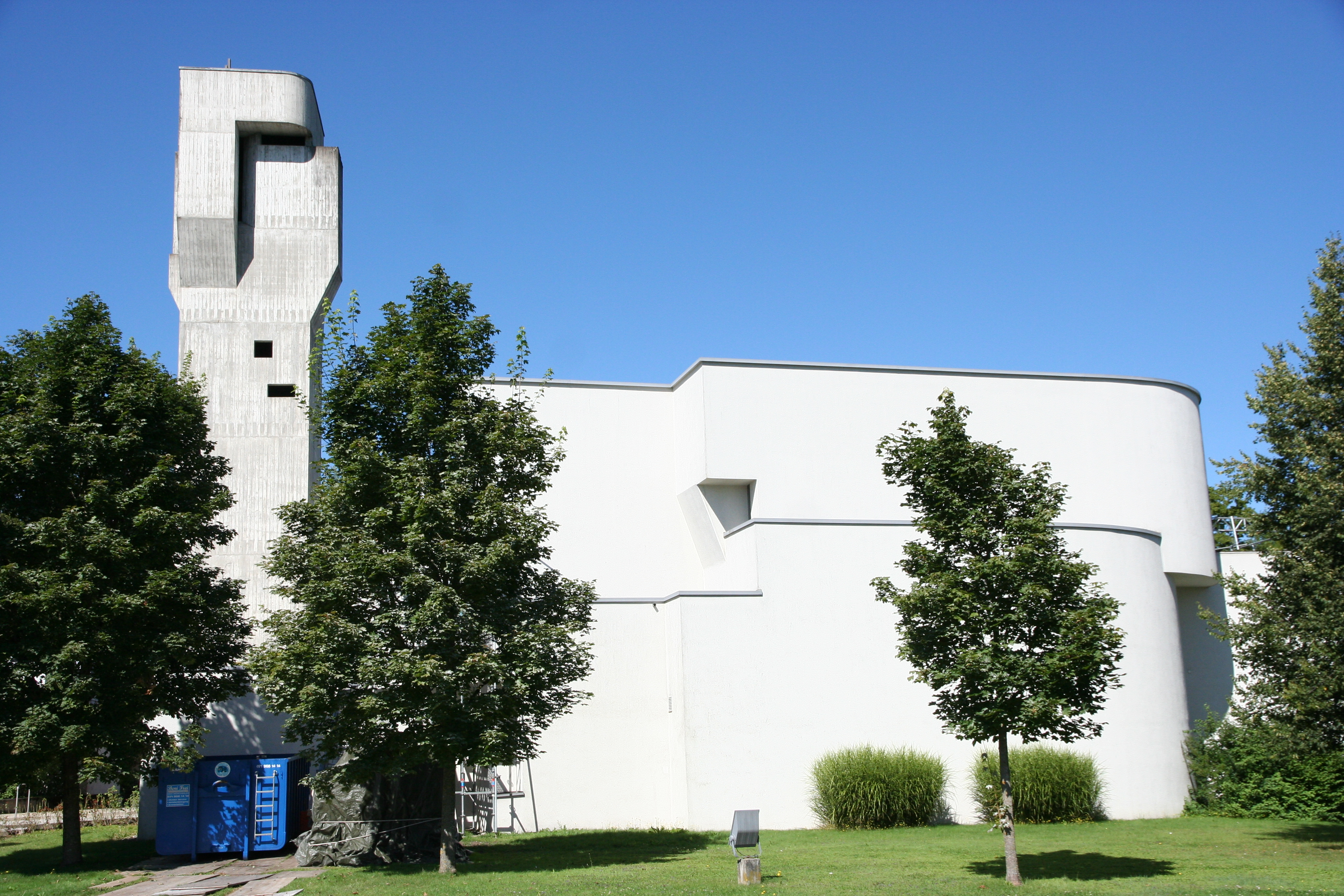 Römisch-katholische Pfarrkirche St. Antonius Münchwilen TG